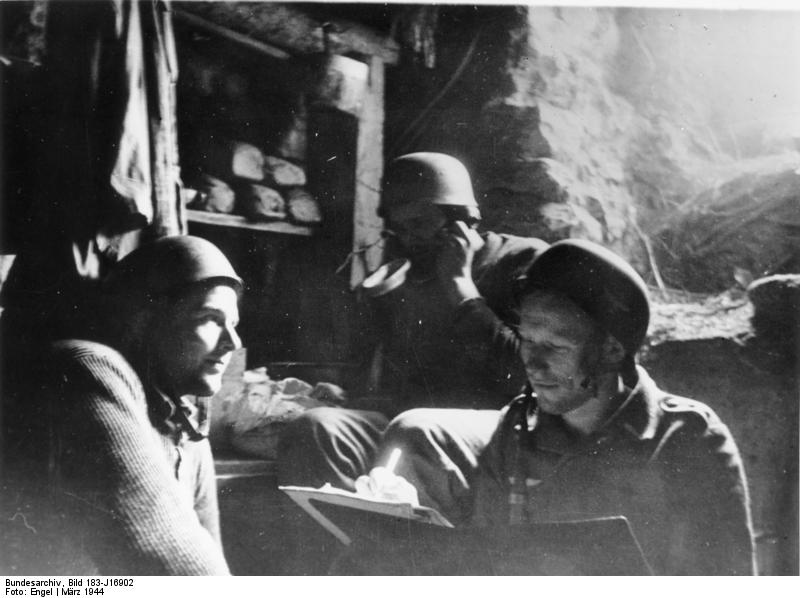 Eine in den schweren Kämpfen um Cassino eingesetzte Fallschirmjägergruppe hat sich eine Höhle als Wohnbunker eingerichtet. Der Raum ist zwar knapp, aber er ist warm und gemütlich. Und sicher ist sicher! Bei dem ständigen Trommelfeuer des Gegners ist es zweckmäßig, den Stahlhelm auch im Bunker aufzubehalten. PK-Aufnahme Kriegsberichter Engel 7.3.1944 [Herausgabedatum]